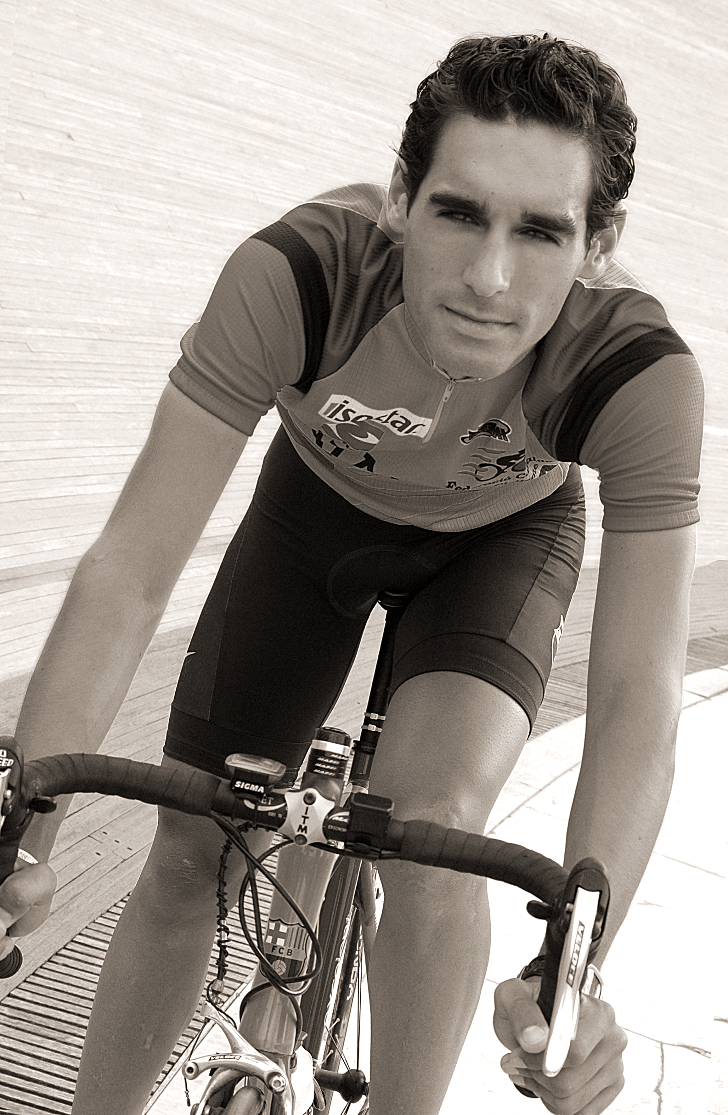 Eduard Gonzalo